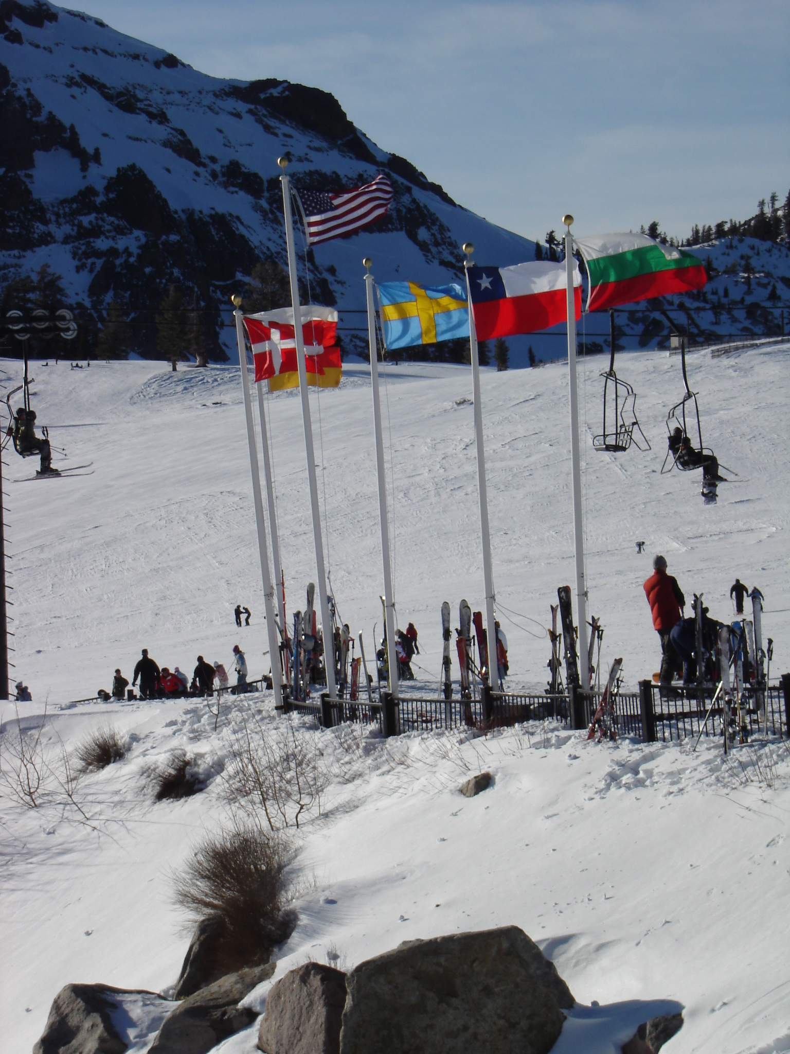 Знамена в Ски курорт Скуо Вали, Калифорния.